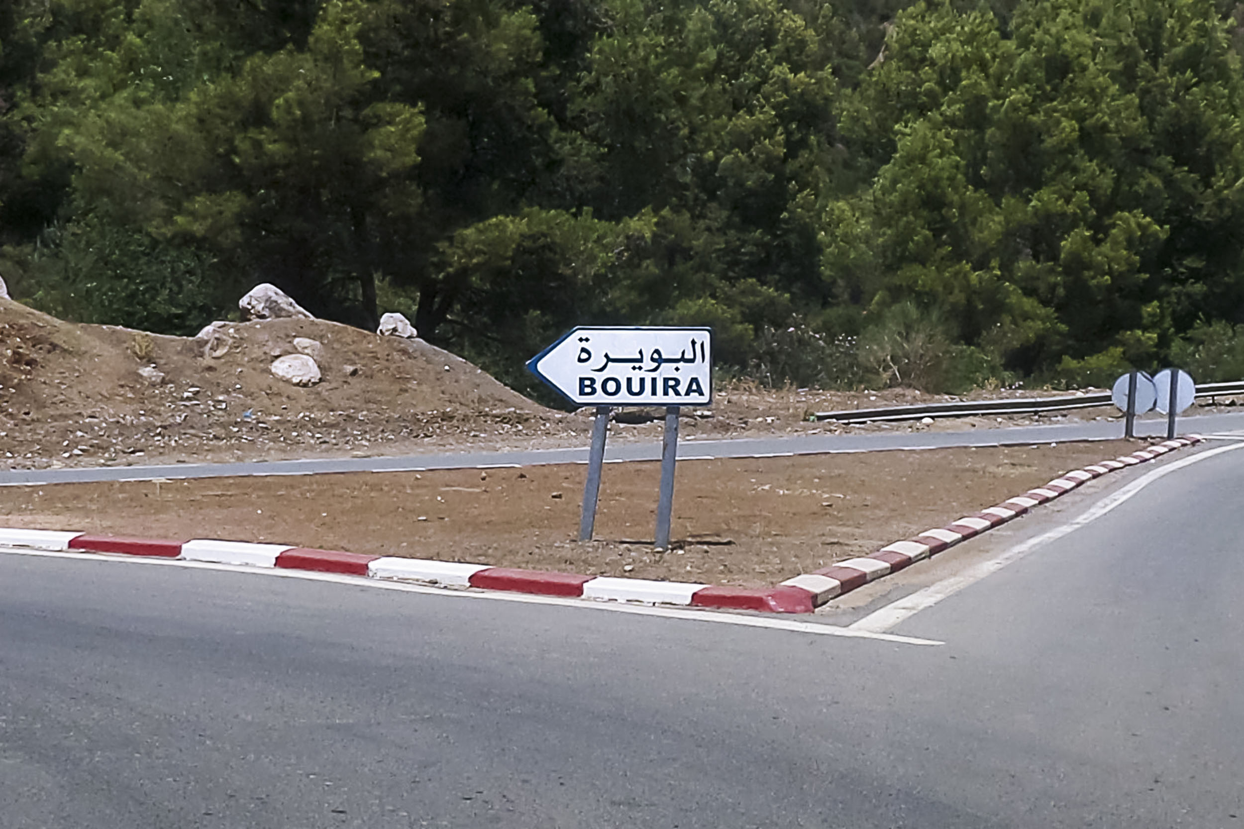 wilaya de Bouira - Algérie ولاية البويرة - الجزائر